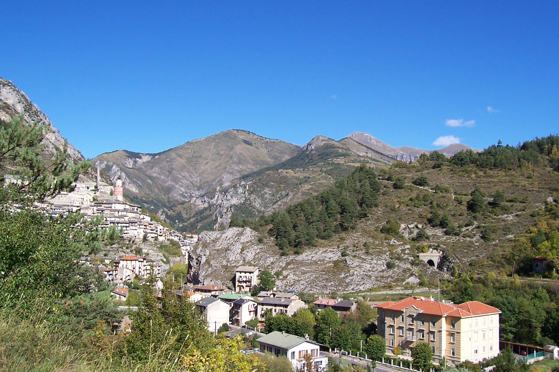 Vue de Tende (Alpes-Maritimes, France) depuis lou Speggi